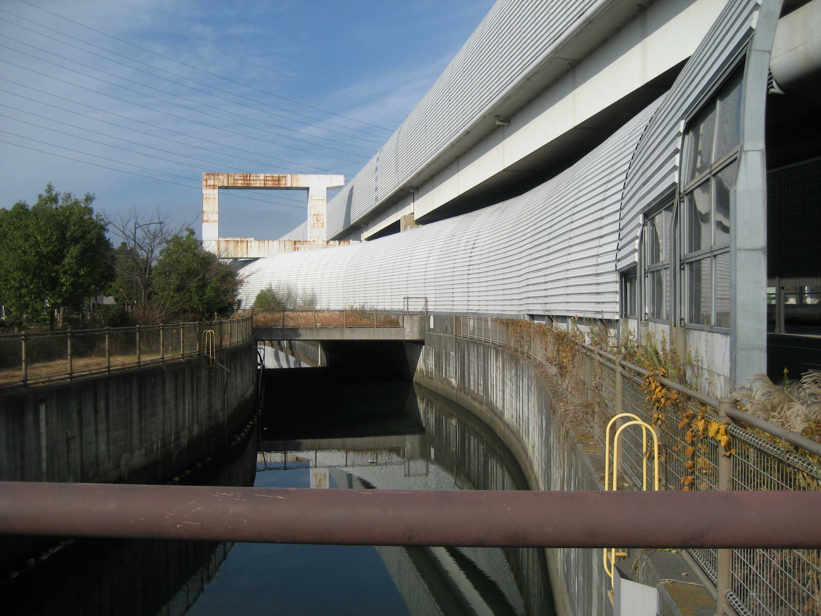 外環道に平行する綾瀬川放水路（埼玉県草加市）